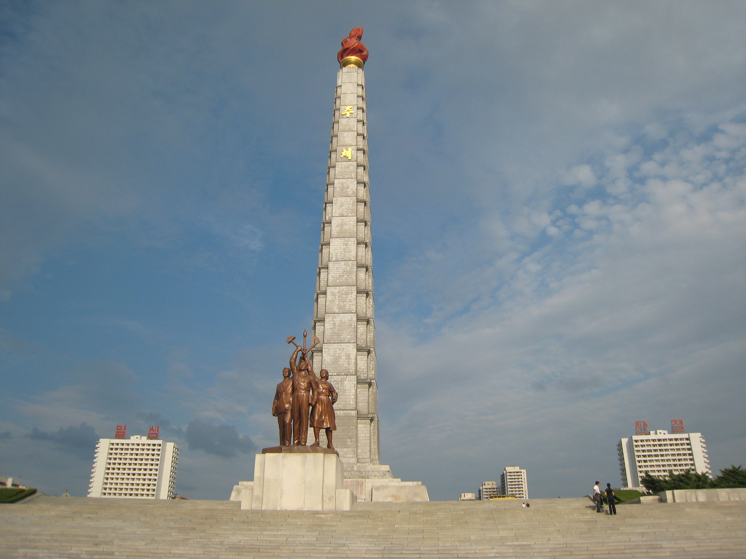 中文（中国大陆）: 主体思想塔